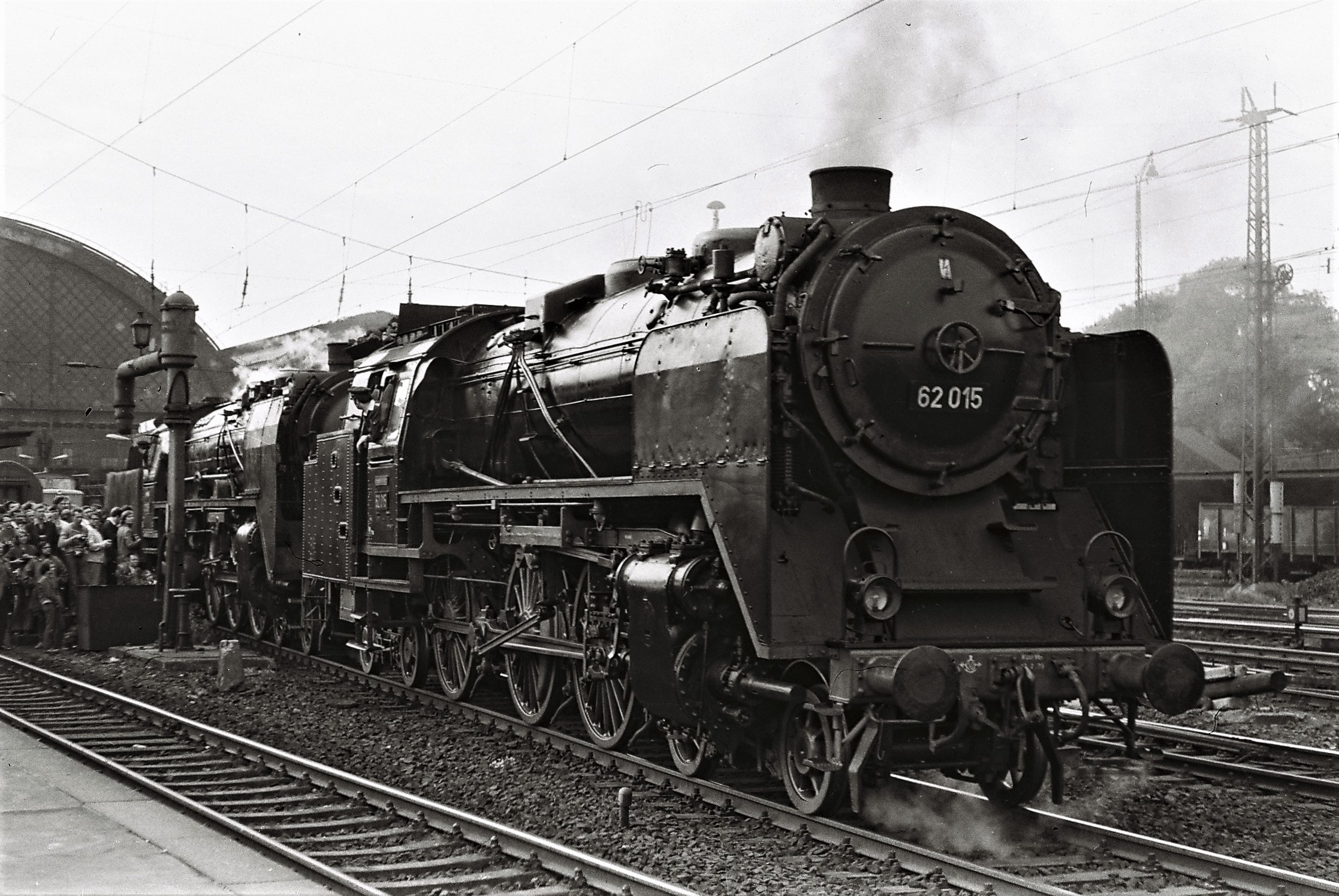 Dampflokomotive der Baureihe 62 der Deutschen Reichsbahn bei einer Sonderfahrt in Dresden Hauptbahnhof.